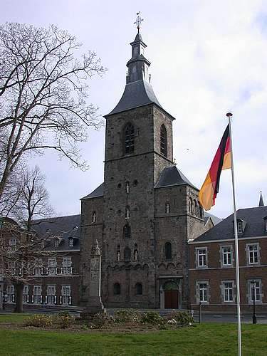 Rolduc, Kerkrade